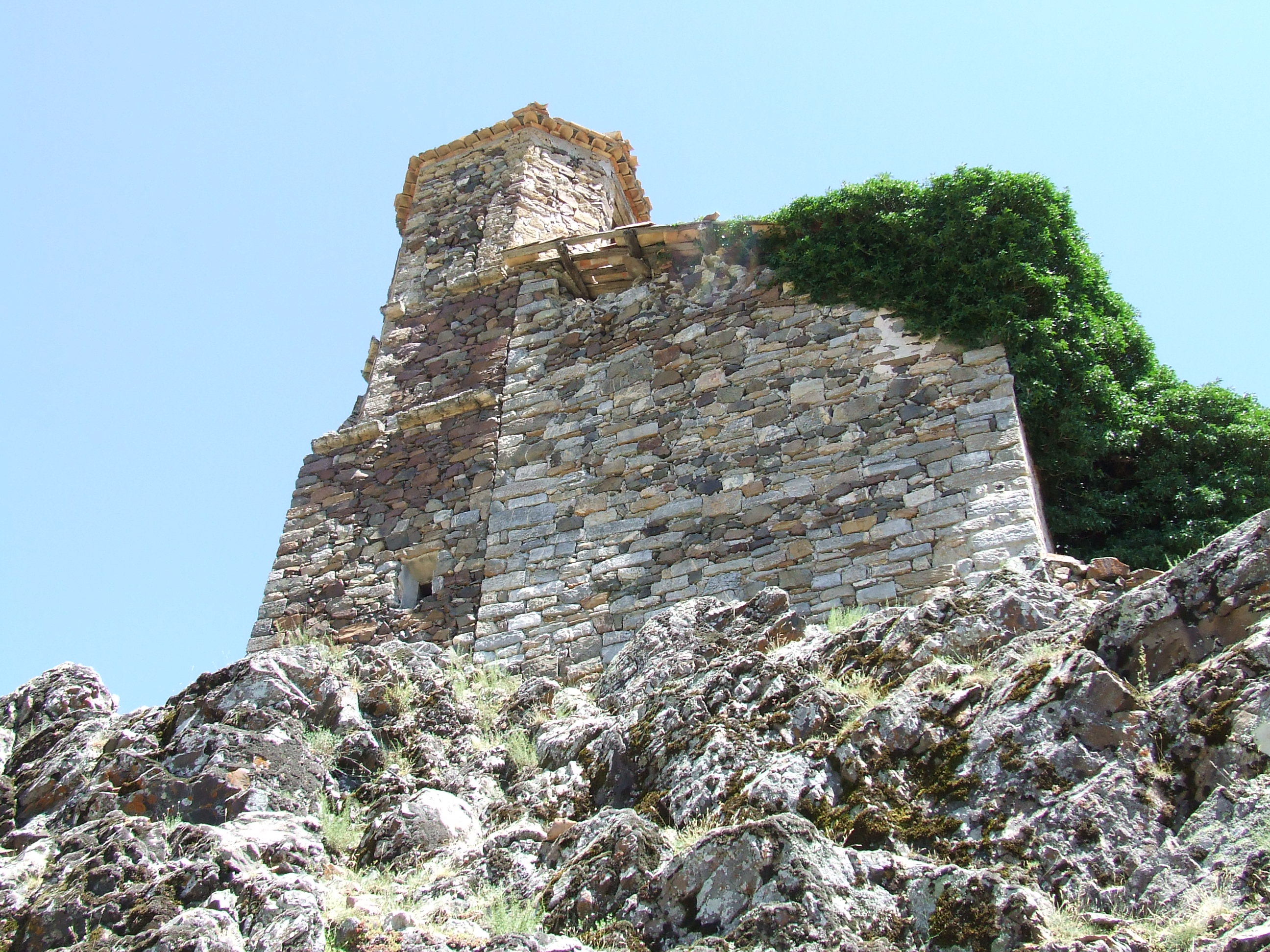 Santa Maria d'Erillcastell, façana de ponent (Malpàs, el Pont de Suert, Alta Ribagprça)